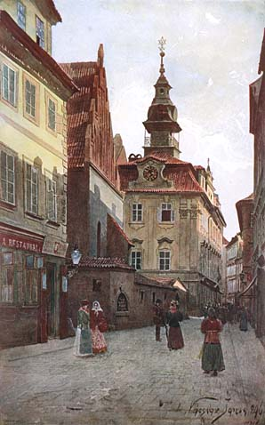 Židovská radnice a Staronová synagoga v Josefově.